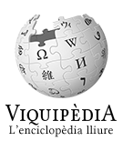 Wikipedia logo 2.0 (ca)